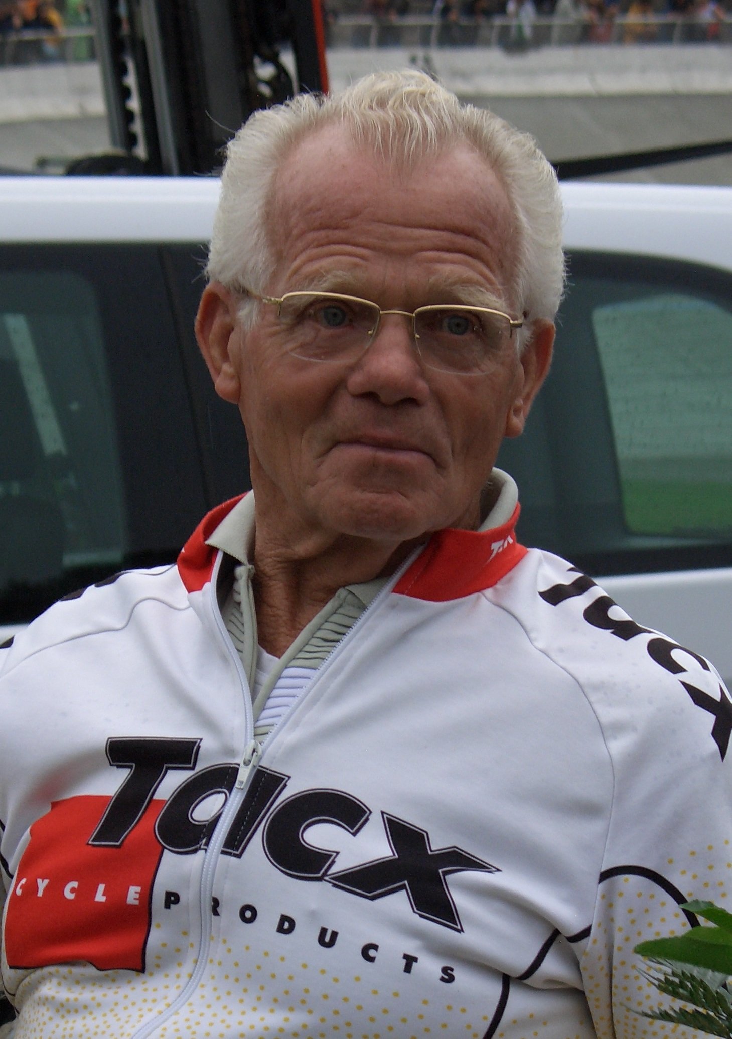 Arie van Houwelingen, niederl. Radsportler, auf der Radrennbahn in Chemnitz am 13. August 2010 anlässl. des 50. Jahrestages der Steher-WM 1960